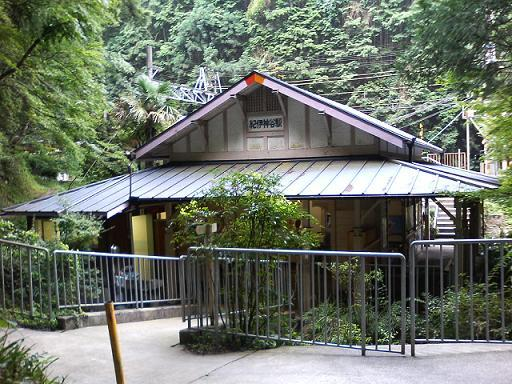 紀伊神谷駅の駅舎 2005年8月13日K's撮影